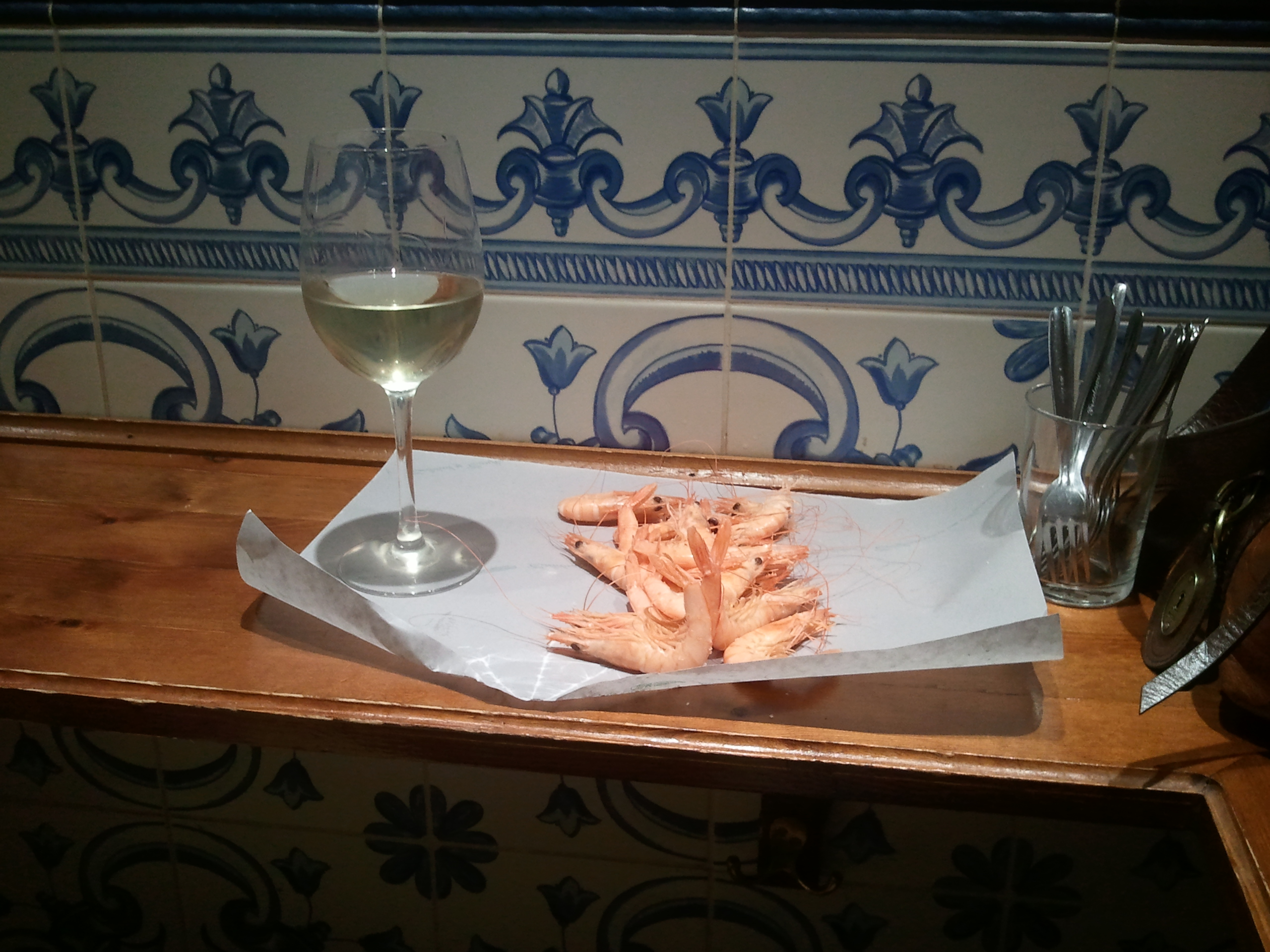 Tapa de gambas blancas con un vino blanco de Rueda en Taberna Casa Curro, Marbella, España.